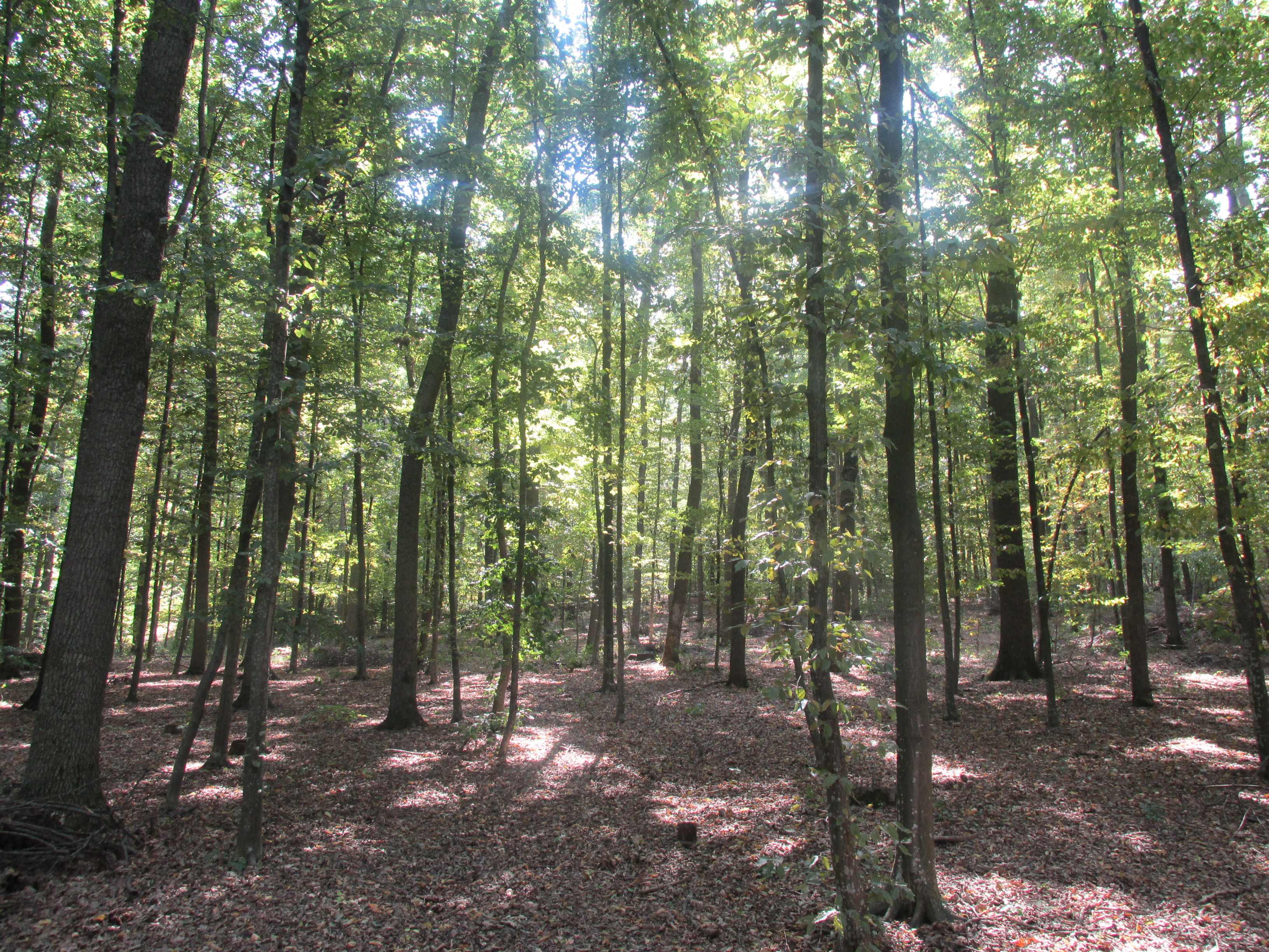 Codru, monument al naturii amplasat în raionul Strășeni, satul Lozova (cod MD-ST-rs-001)